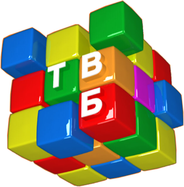 Лого "ТВ Бахористон" (2015-2018 год)